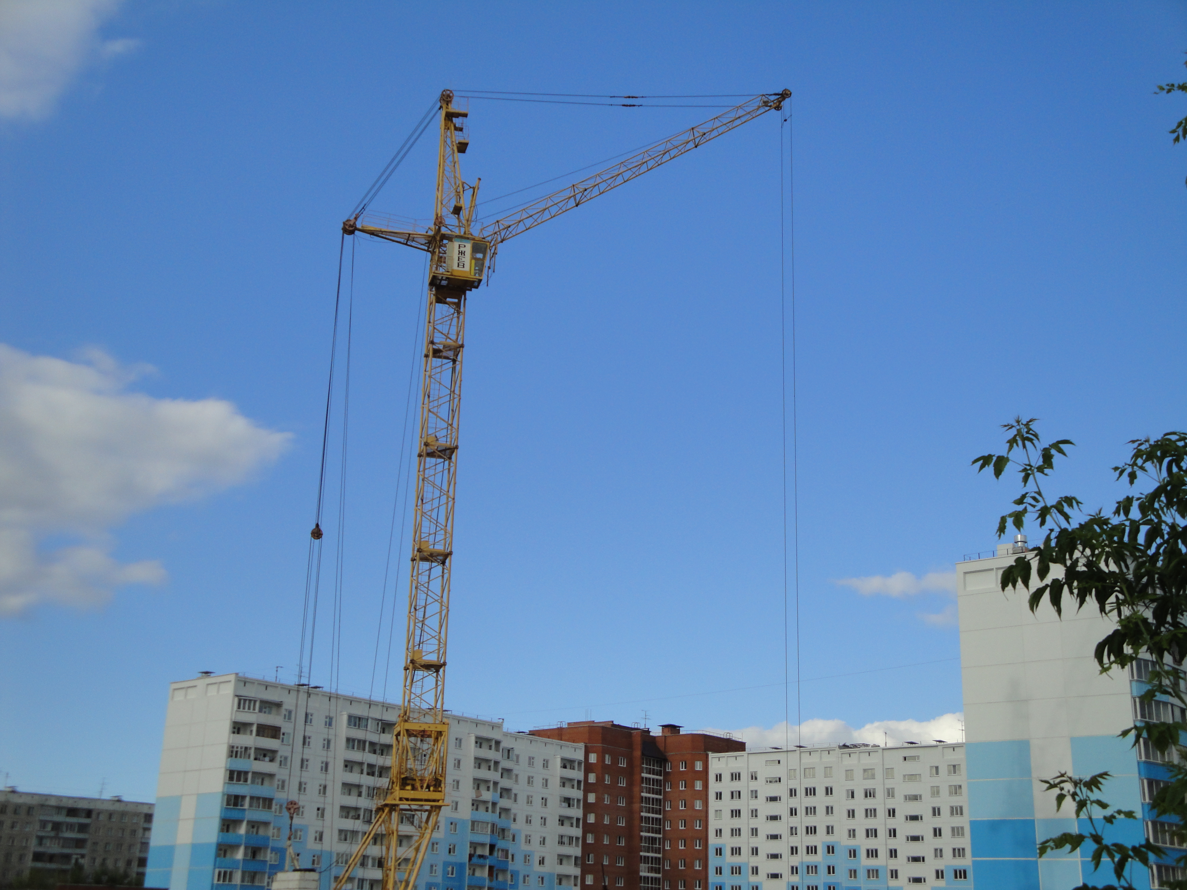 Кран КБМ-401П с подъёмной стрелой на строительстве жилого дома